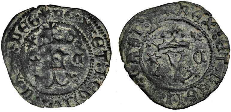 Blanca de los Reyes Católicos, acuñada en Cuenca.